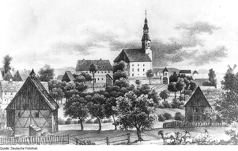 Original image description from the Deutsche Fotothek Oderwitz-Niederoderwitz. Ortsansicht